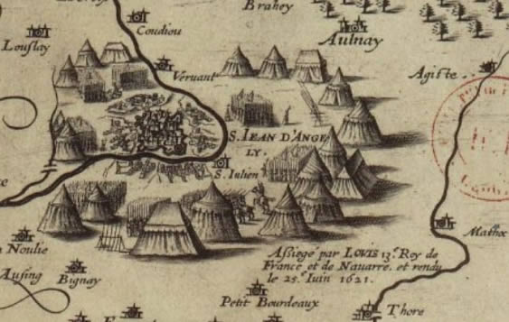 Siege_de_Saint_Jean_d_Angely_1621